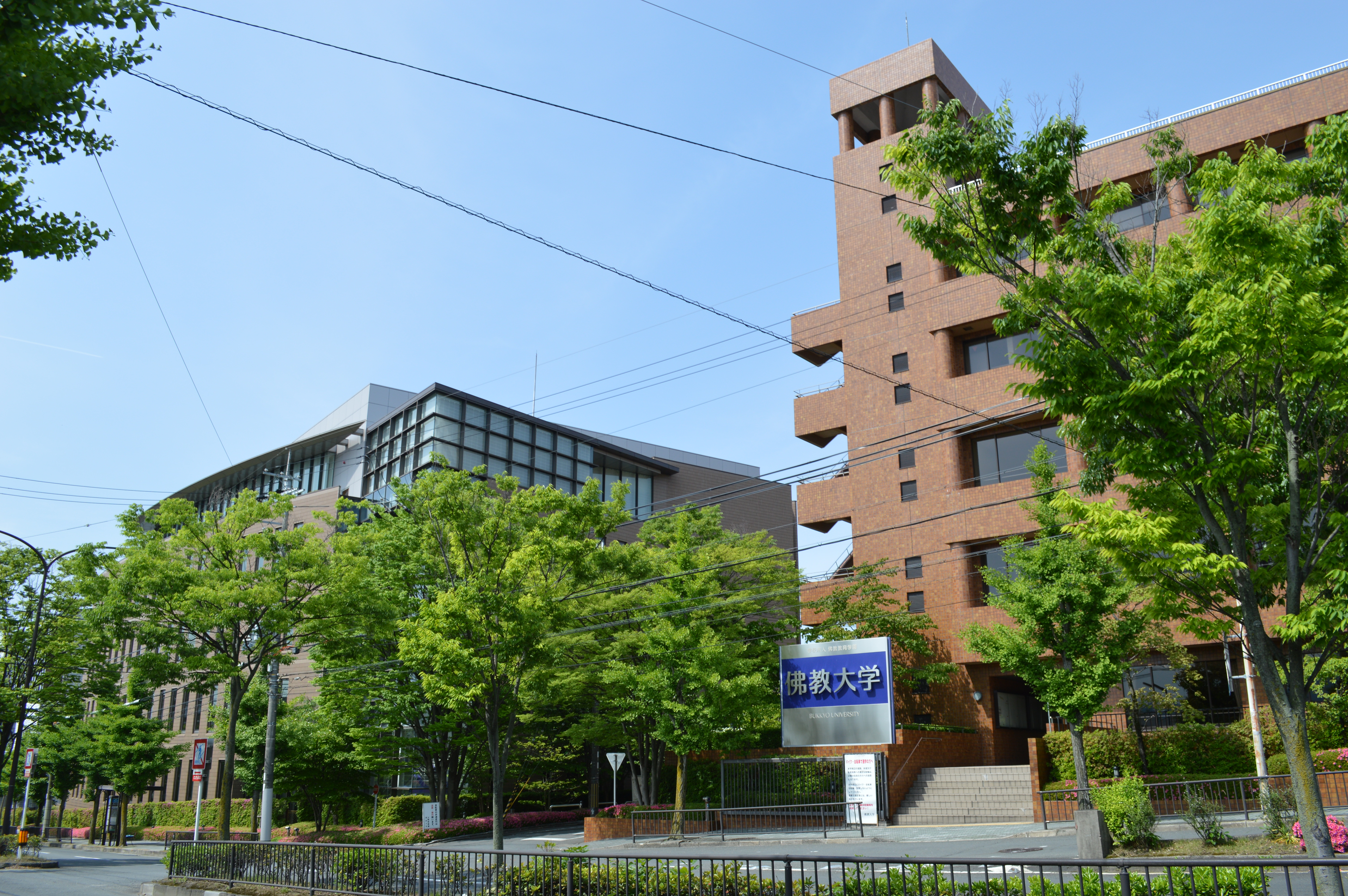 京都市北区紫野 佛教大学紫野キャンパス 7号館（右）と成徳常照館（左）と北大路通（手前）